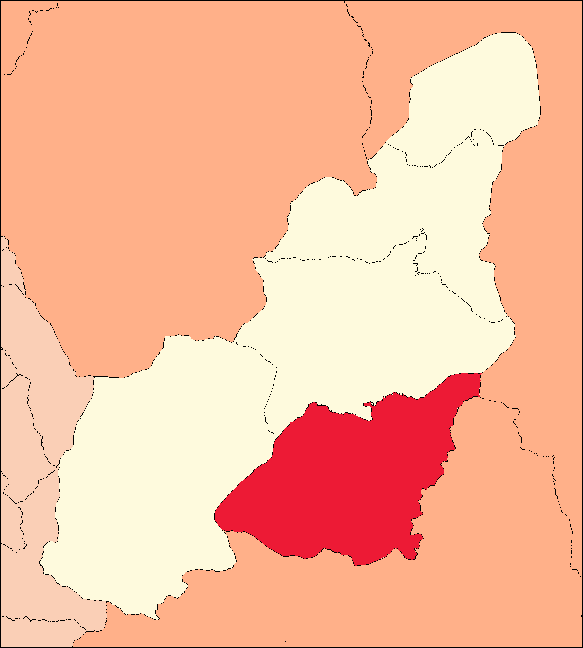 Área del distrito de Yuyapichis.